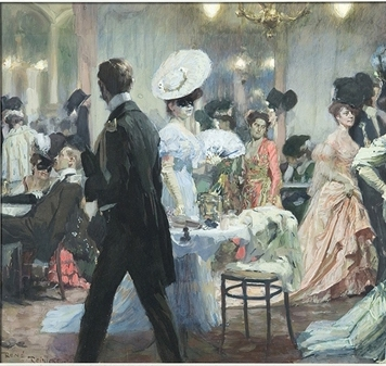 Künstler René Reinicke Titel Masks ball scene Medium watercolor, gouache, pencil Größe 17,7 x 18,9 in. / 45 x 48 cm. Jahr 1900 - Bez. Signed